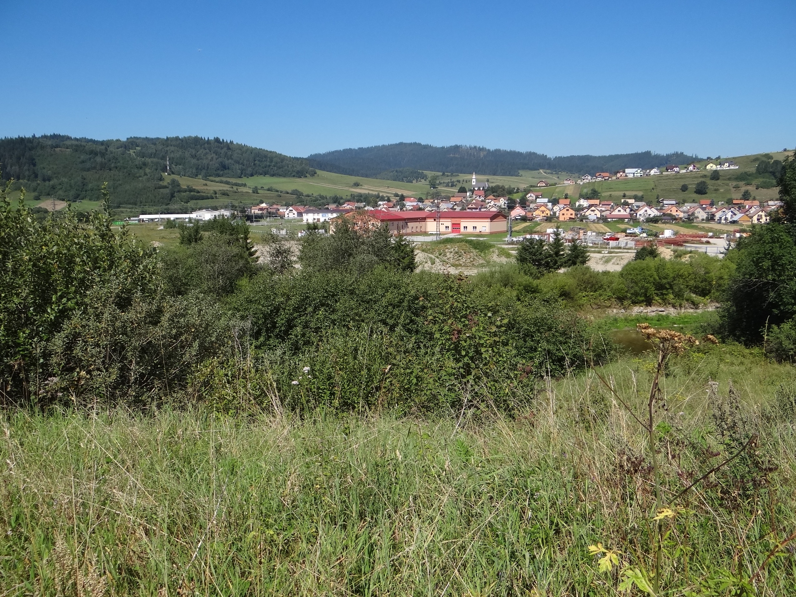 Oravská Jasenica (Jasienica Orawska). Po lewej stronie wzgórze Havrani